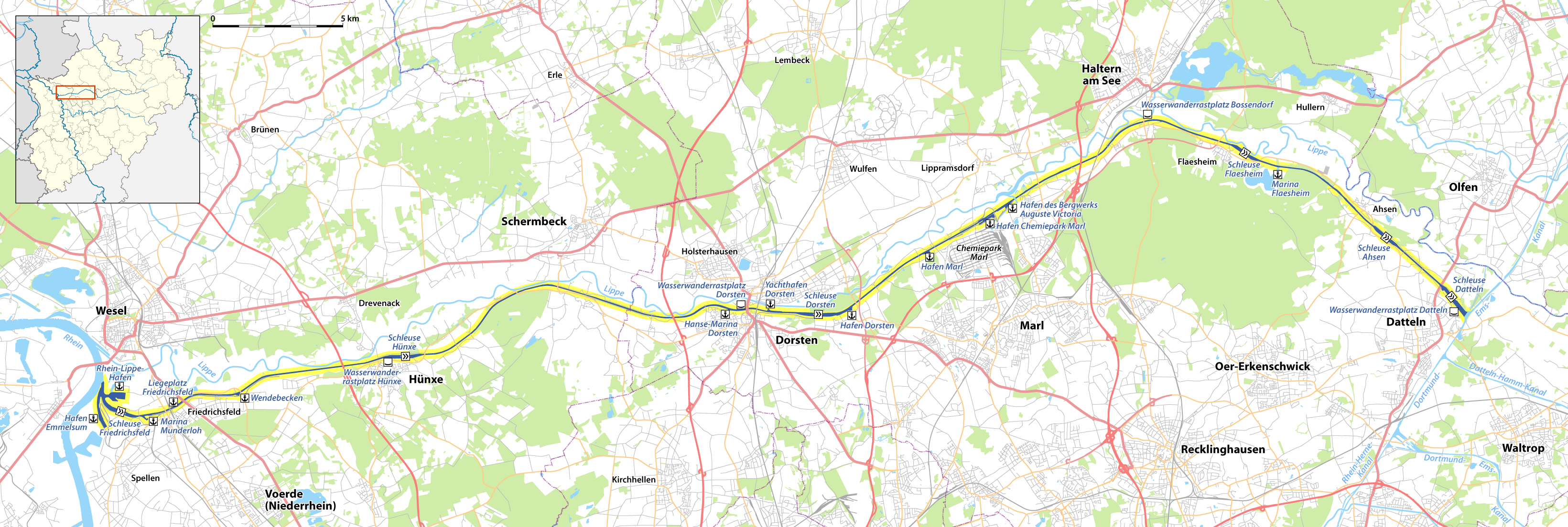 Karte des Wesel-Datteln-Kanals